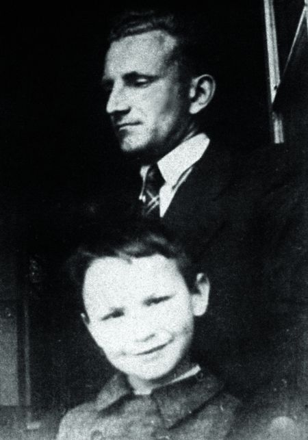 Роман Шухевич із сином Юрієм Шухевичем.